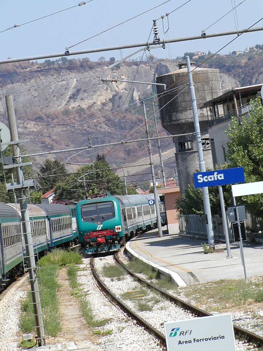 Statione di Scafa